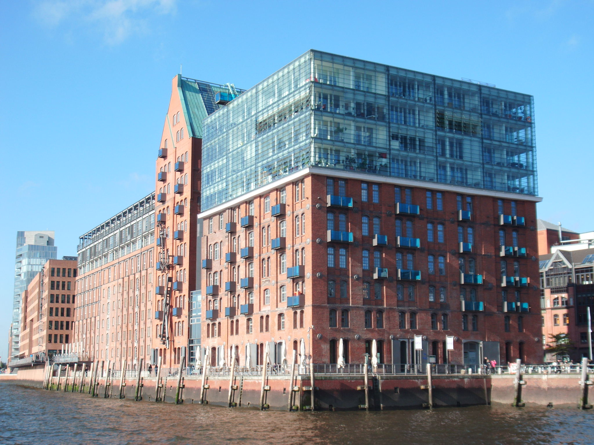 Ehemalige Hafengroßmühle H. W. Lange, 1841 als eine der ersten Dampfmühlen in Norddeutschland gegründet, massive Backsteinbauten von 1880, später erweitert und aufgestockt.This is a photograph of an architectural monument.